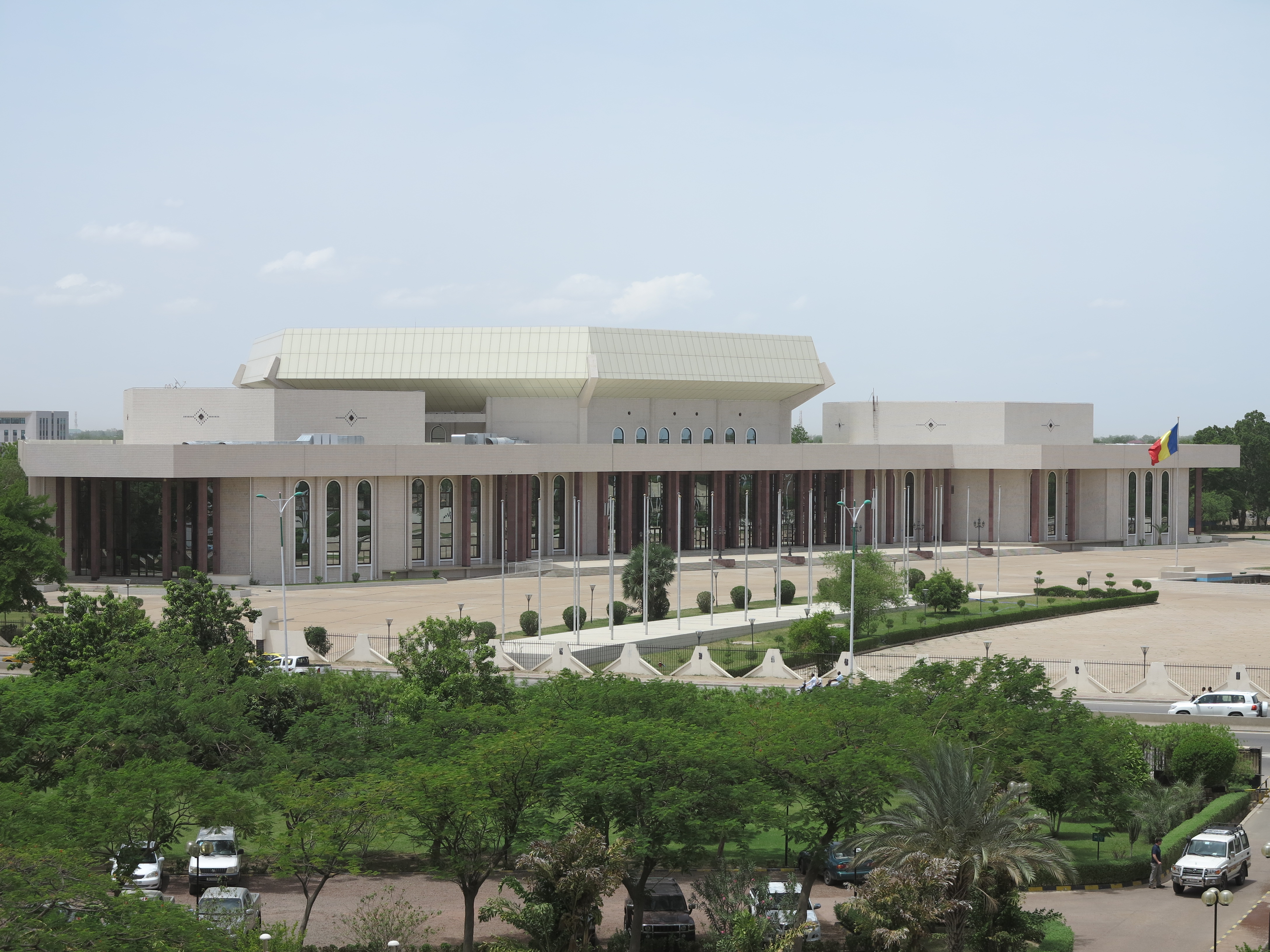 Siège de l'Assemblé. N'DJAMENA